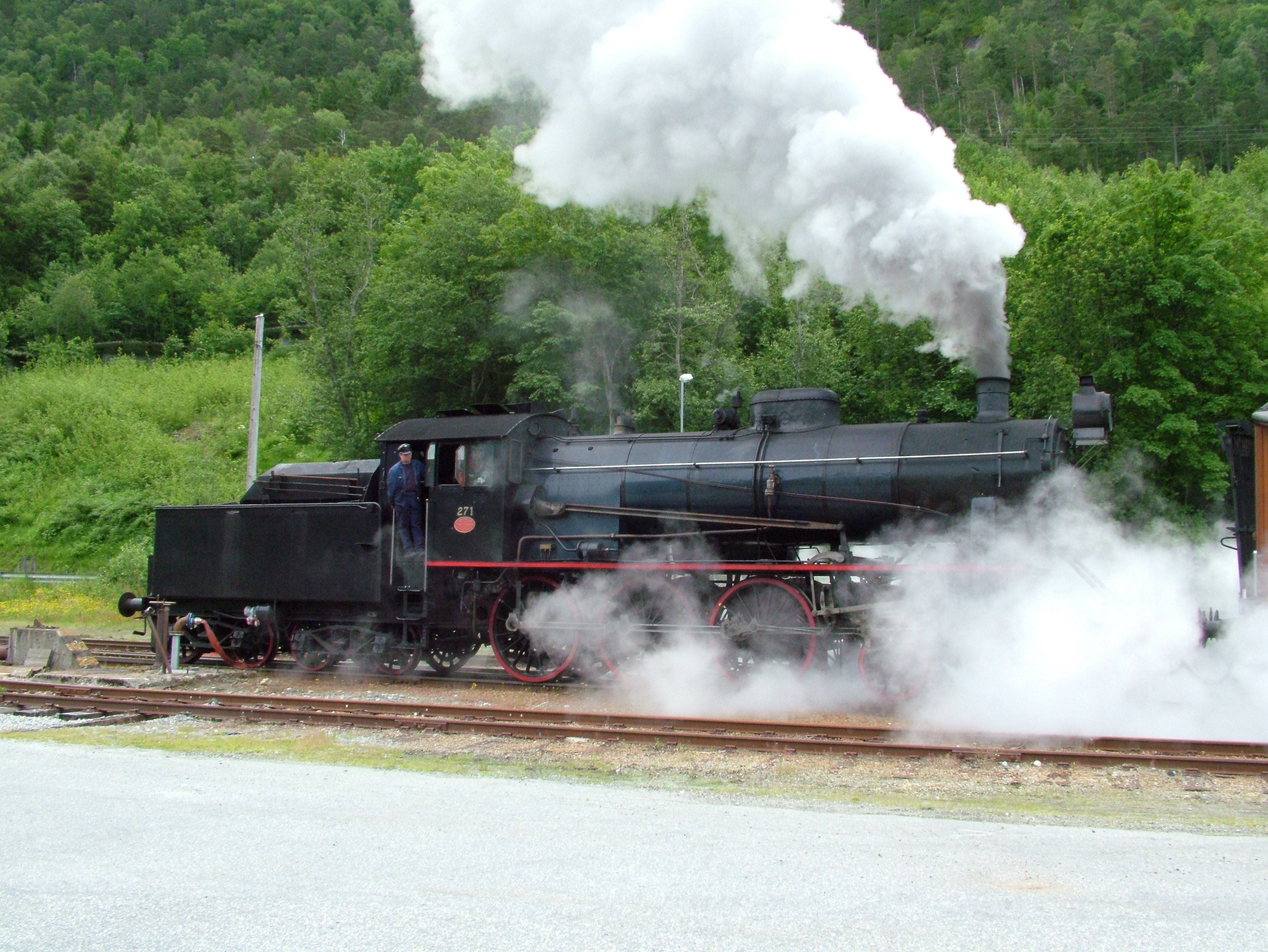 eine Dampflokomotive der Raumabahn in Aandalsnes, Norwegen